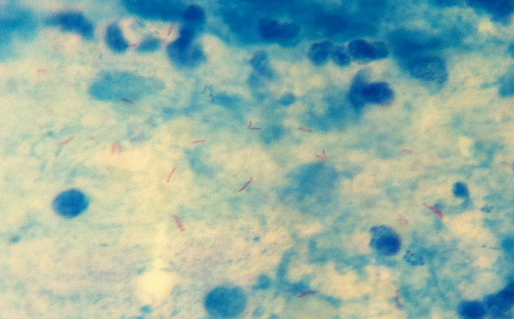 Frottis d'expectoration colorée au Ziehl-Nielsen, chez une patiente qui presentait les signes cliniques d'une tuberculose (vue au microscope optique avec l'objectif 100x à l'huile d'immersion). Elle montre en rouge des Mycobacterium tuberculosis, mycobactérie responsable de la tuberculose.